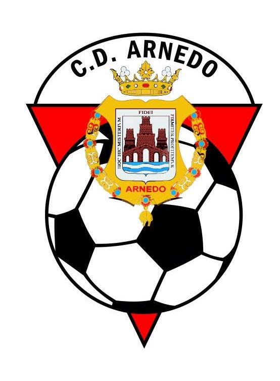 escudo del cd arnedo